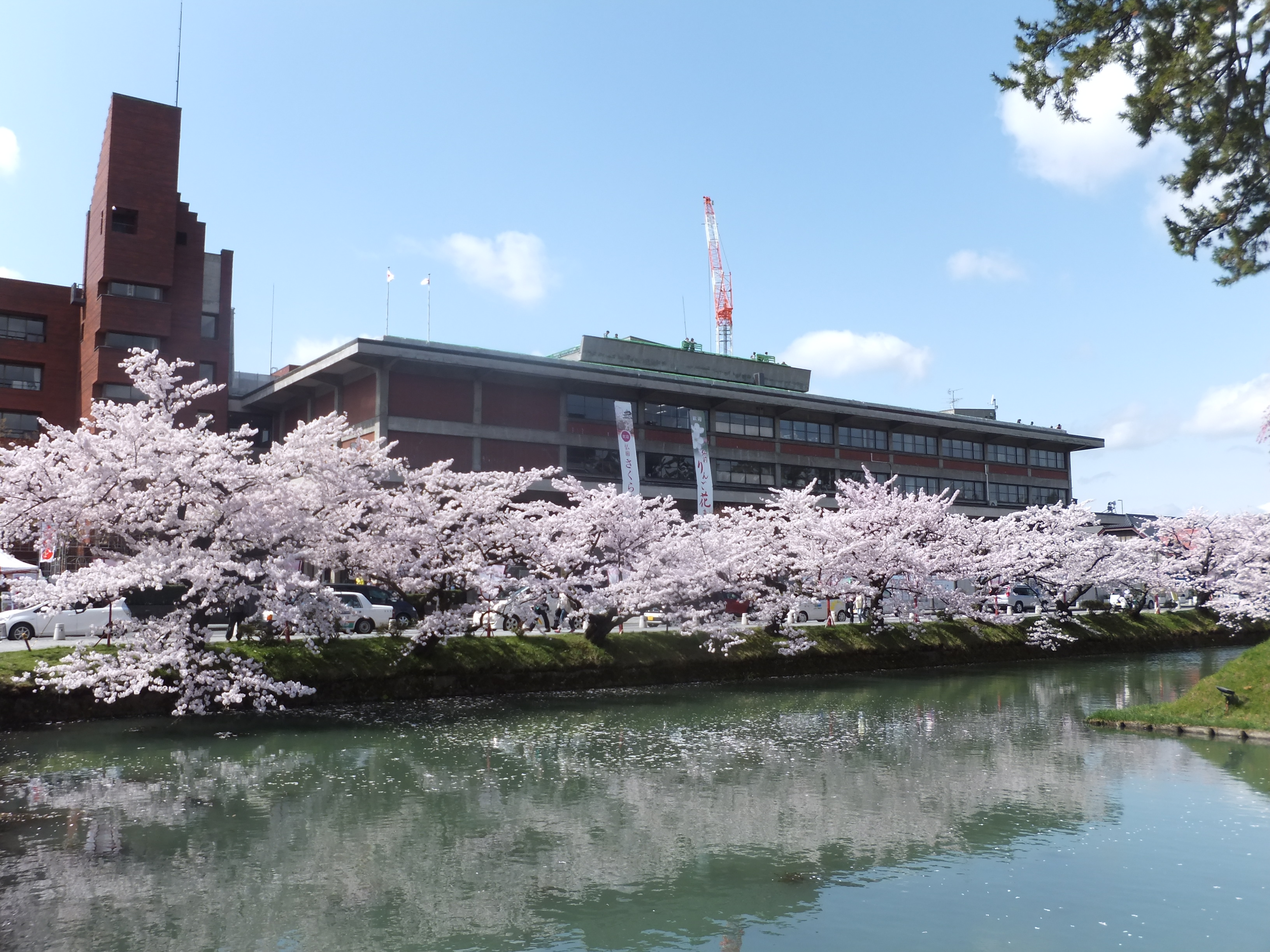 満開のサクラと弘前市役所。撮影当日ソメイヨシノの満開宣言が出された。